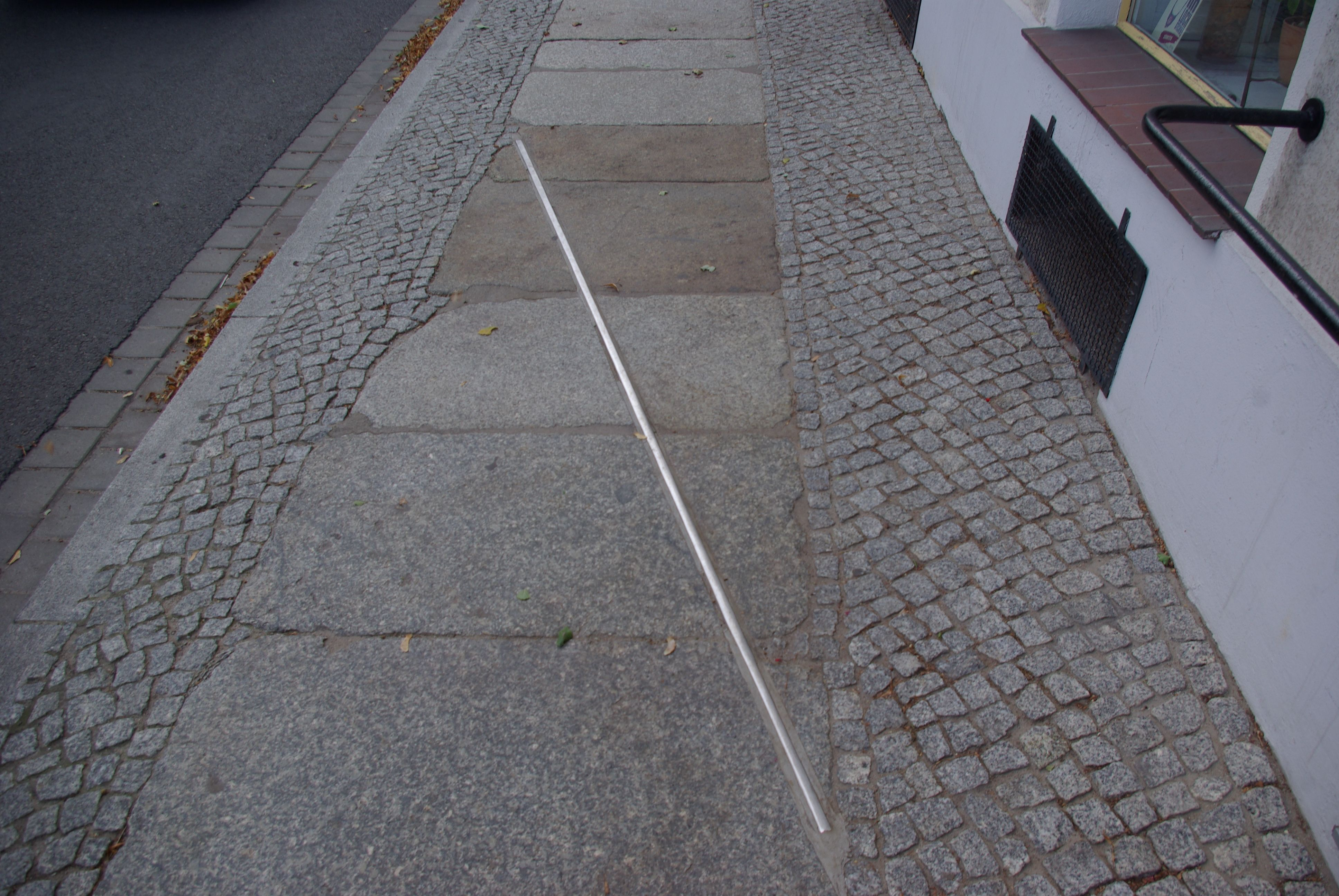 Angermünde in Brandenburg. Durch Angermünde läuft der 14. Meridian. Hier ist er gekennzeichnet. Die Knnezeichnung liegt an der Berliner Straße gegenüber der Helig-Geist-Kapelle.